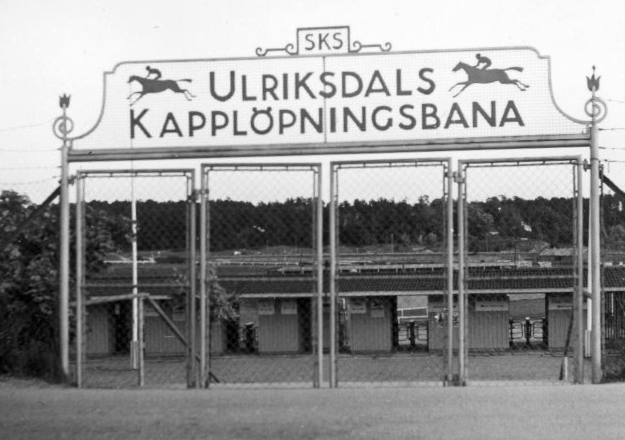 Ulriksdals kapplöpningsbana entré